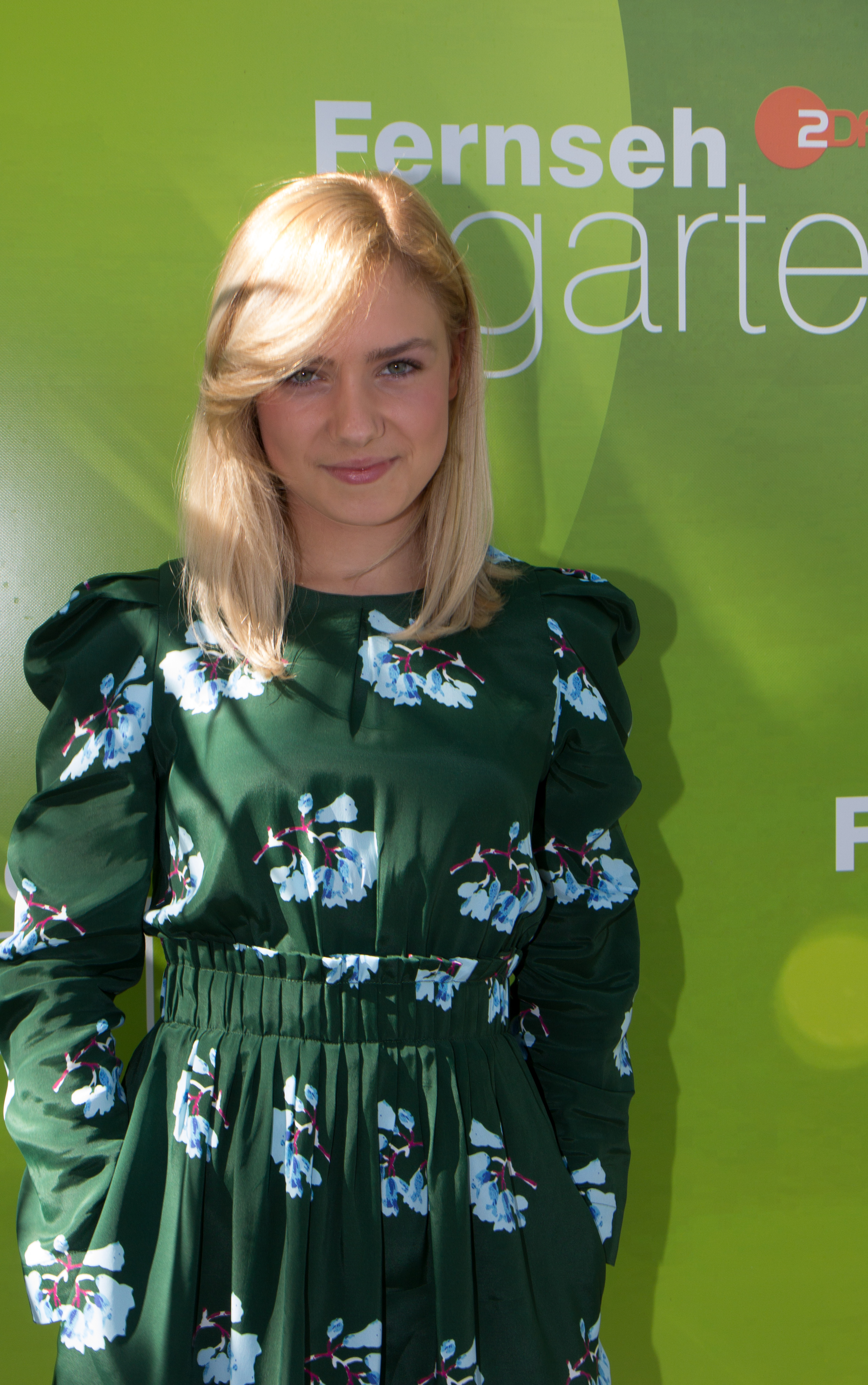 Marie Wegener als Gast im ZDF-Fernsehgarten am 16. September 2018 in Mainz.